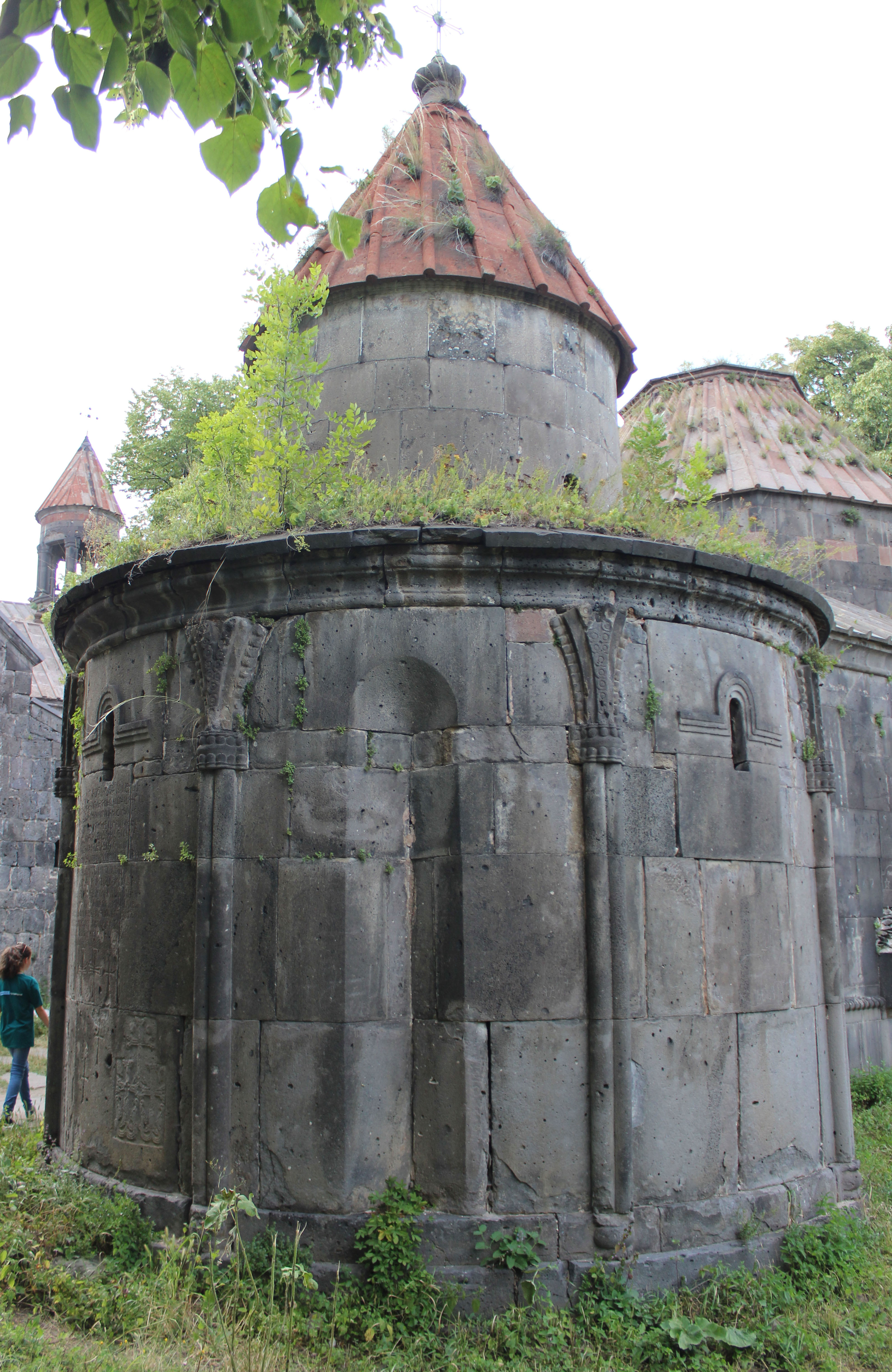 Վանական Համալիր Սանահին 10-13 դդ., Սանահին թաղամասի կենտր. բարձրադիր մասում 2/33